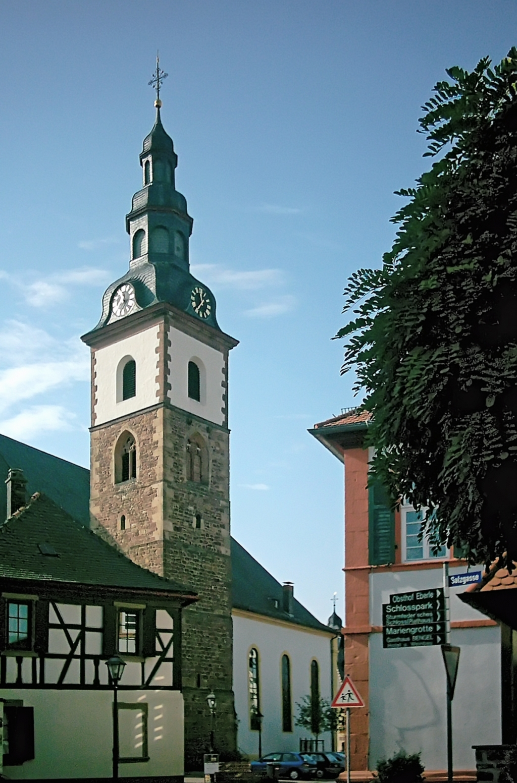 Bearbeitete Version von Image:Dirmstein-Laurentiuskirche-Nord.jpg durch --Liberaler Freimaurer (Diskussion) Original-Beschreibung: (Uploaded by Benutzer:Mundartpoet) Summary Nordostansicht der Laurentiuskirche zu Dirmstein, Aufnahme durch Ortsbürgermeister Jürgen Schwerdt, Freigabe (GNU-Lizenz) gem. Mail vom 28.04.2006 an Benutzer:Mundartpoet Uploaded with Reworkhelper